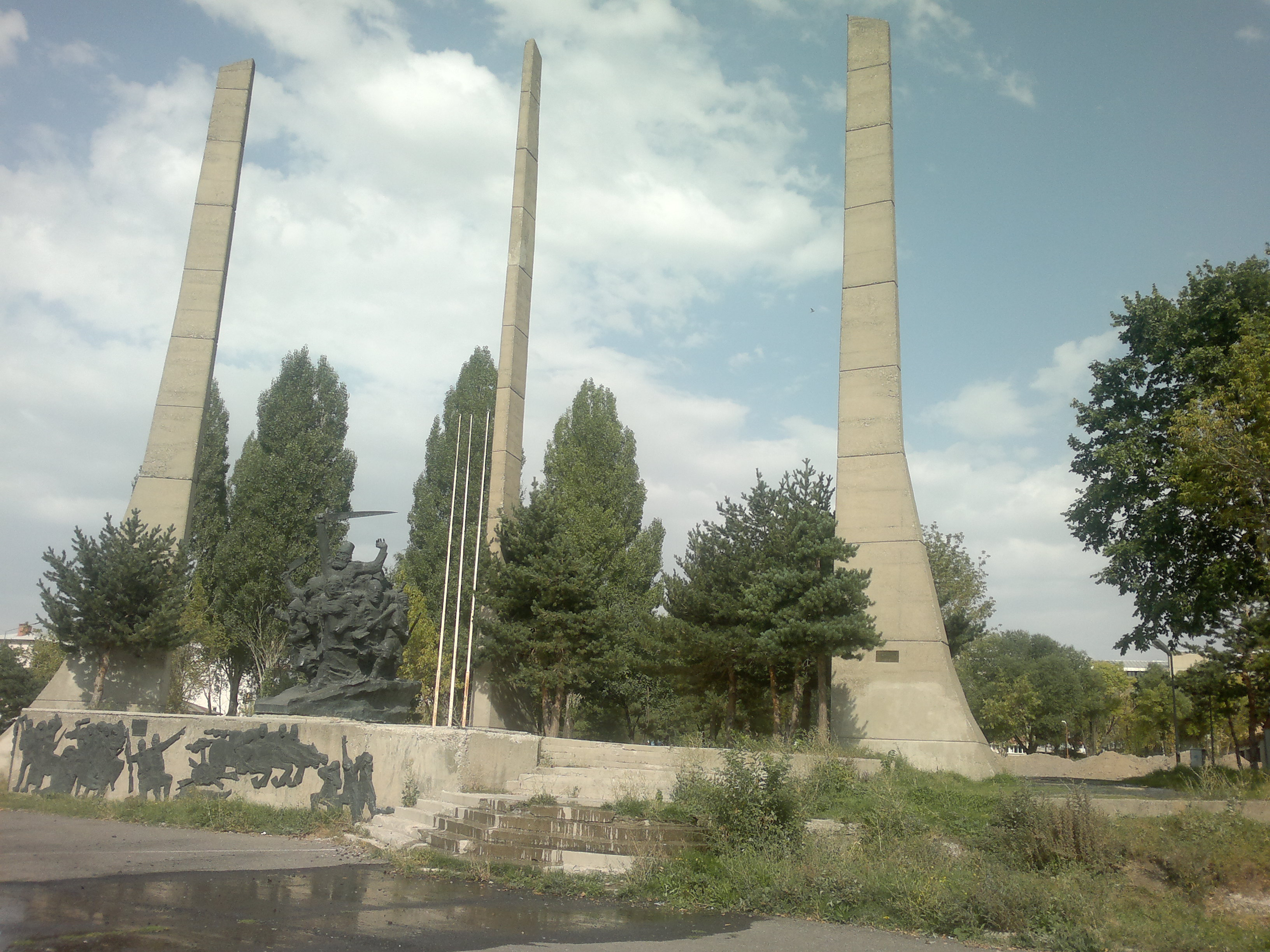 Türkiye'de Erzurum ili şehir merkezi girişindeki Erzurum Özgürlük Anıtı